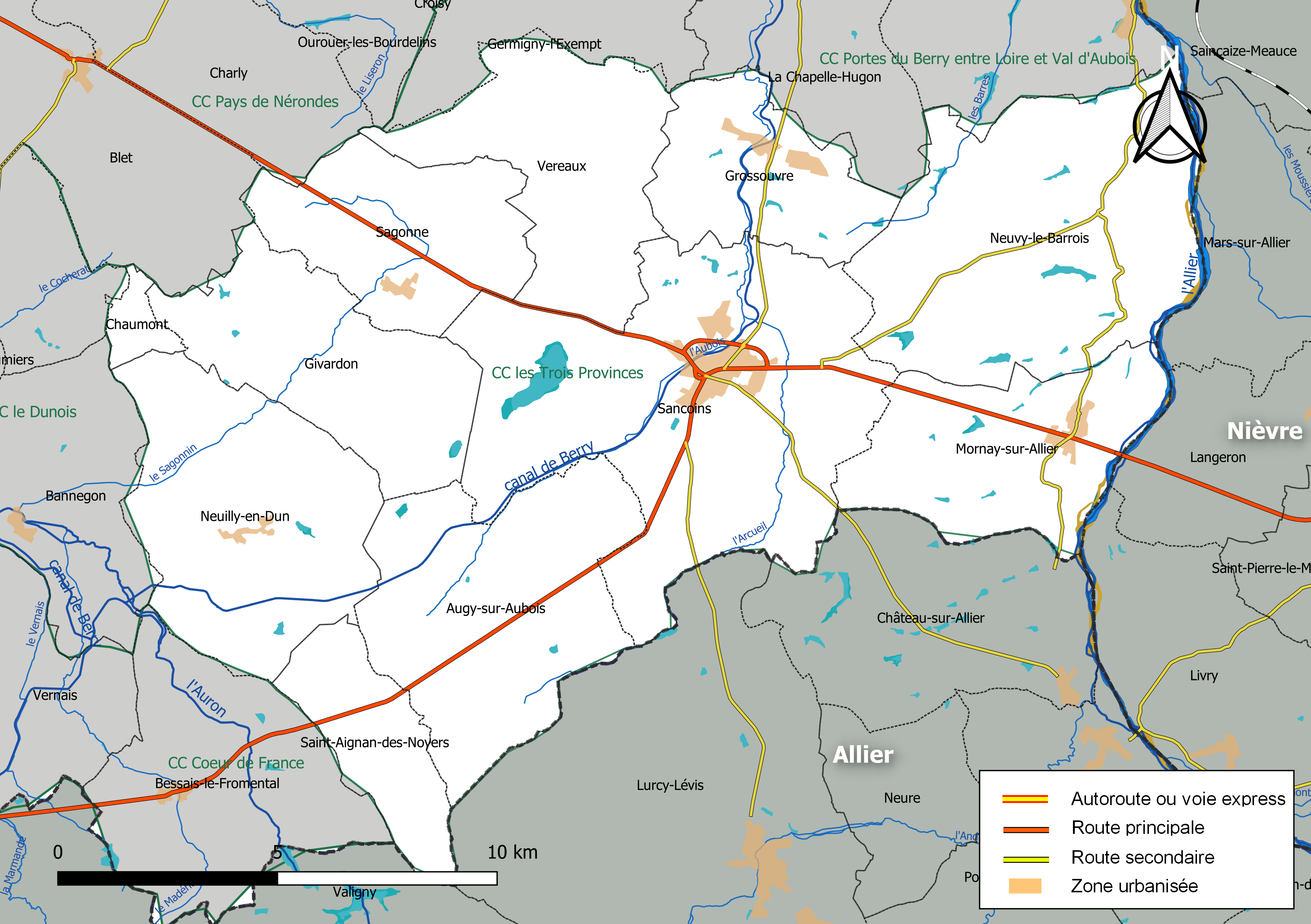 Carte géographique de la communauté de communes Les Trois Provinces, département du Cher, France. Composition au 1er janvier 2019.